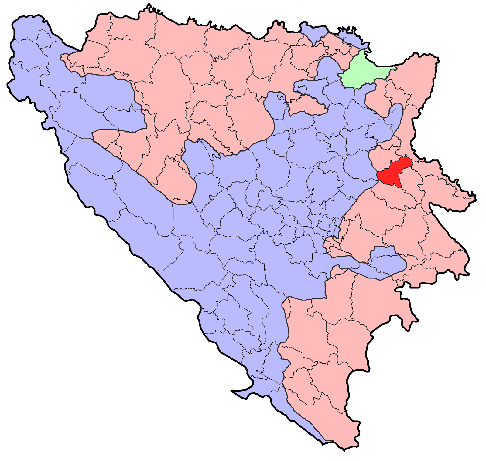 Republika Srpska (BiH) municipality